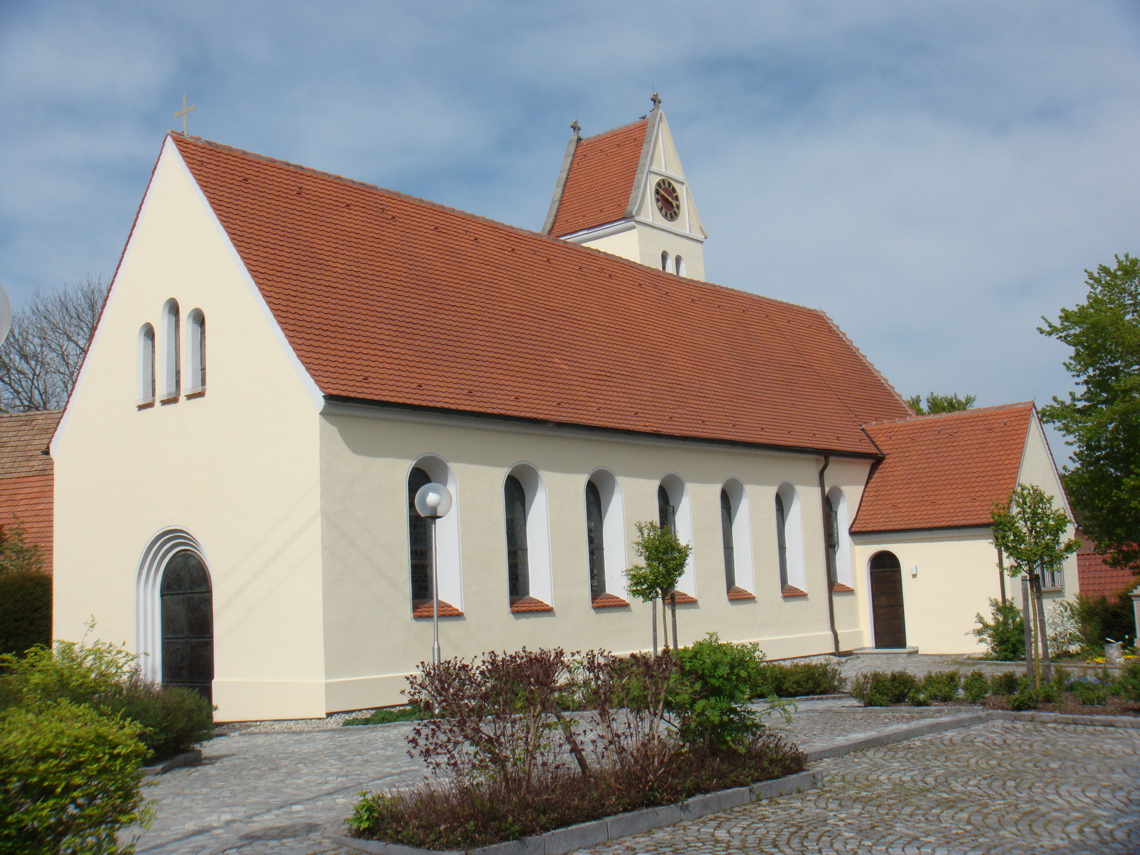 Kirche zur Heiligsten Dreifaltigkeit Dorndorf